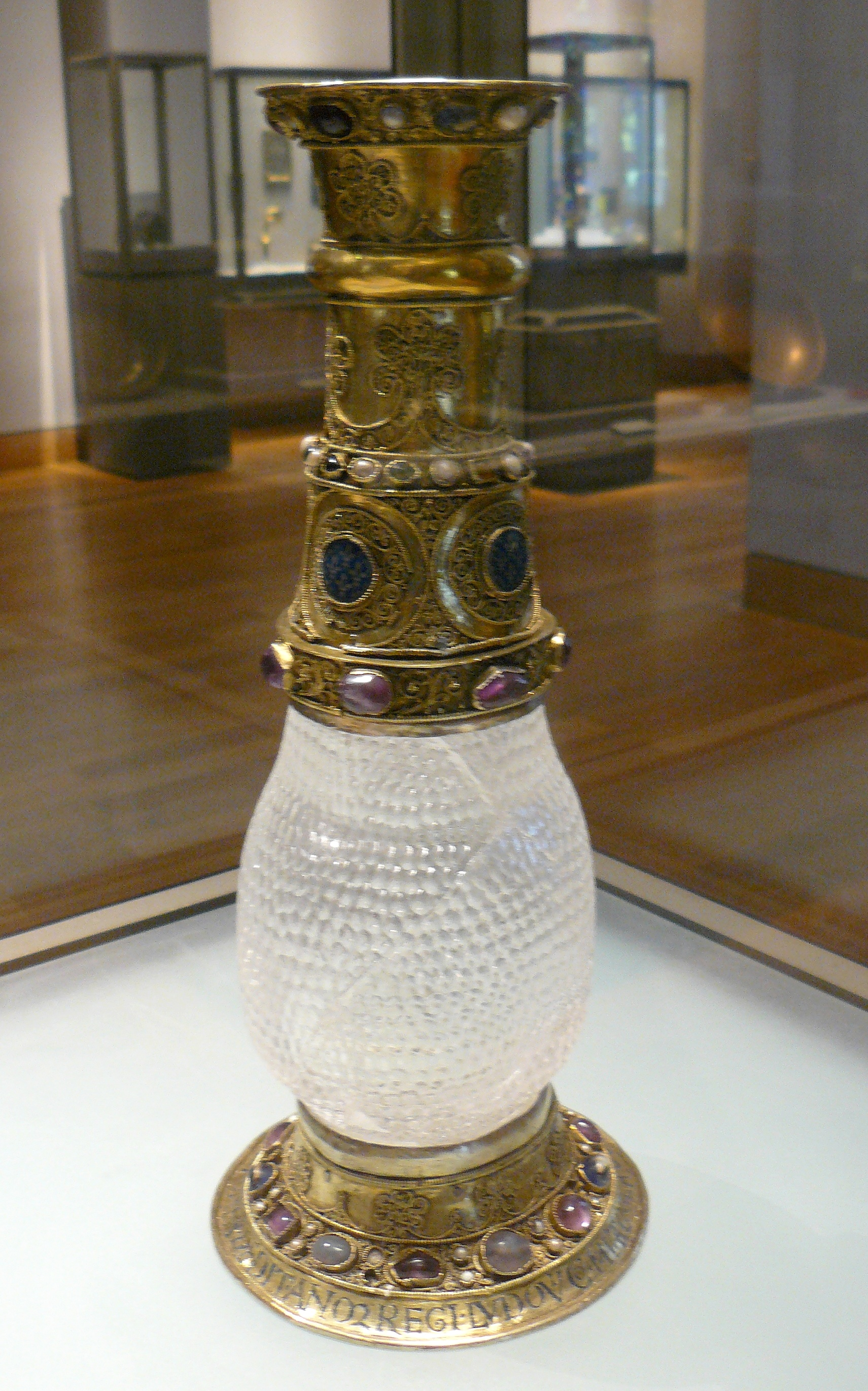 Vase d'Aliénor - Cristal de roche, argent doré, pierres précieuses, perles, émaux - VIe ou VIIe siècle (vase), avant 1147 (monture) - Hauteur 33,7 cm. - Trésor de Saint-Denis puis Musée du Louvre, Inv n° MR 340